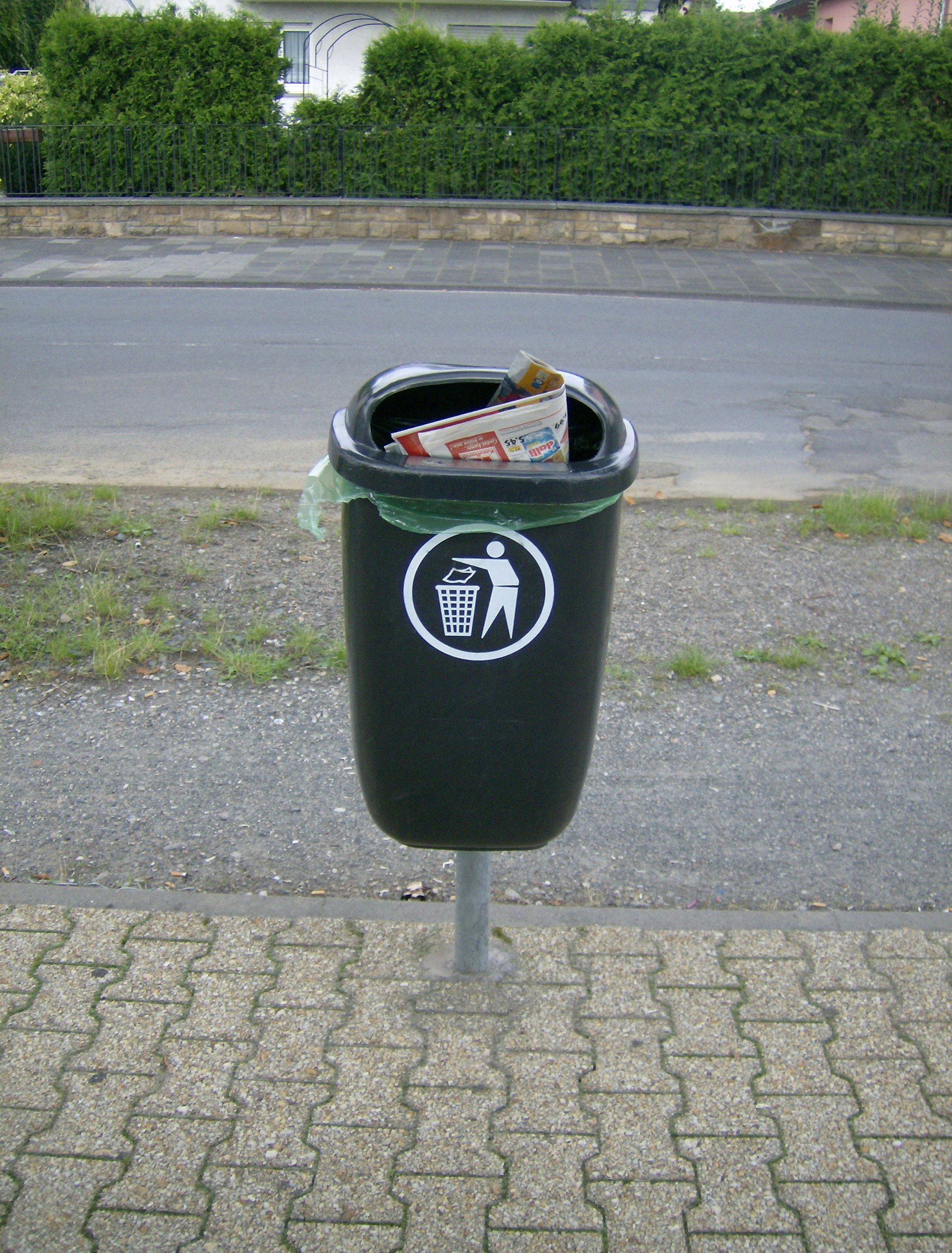 Ein an einer ÖPNV-Haltestelle angegliederter Mülleimer